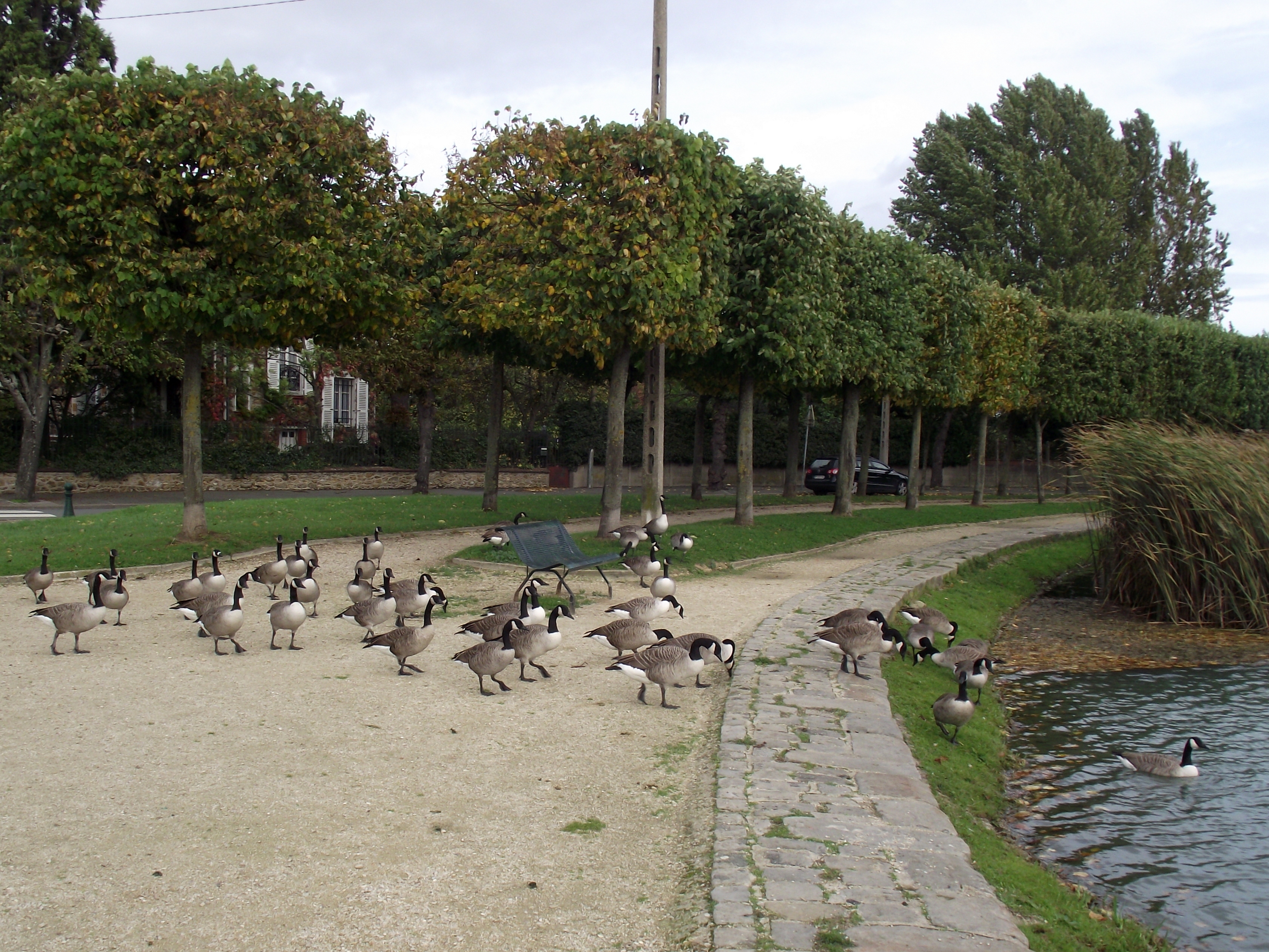 Berrnaches du Canada au lac du Château Frayé à Vigneux-sur-Seine (Essonne, Île-de-France, France).